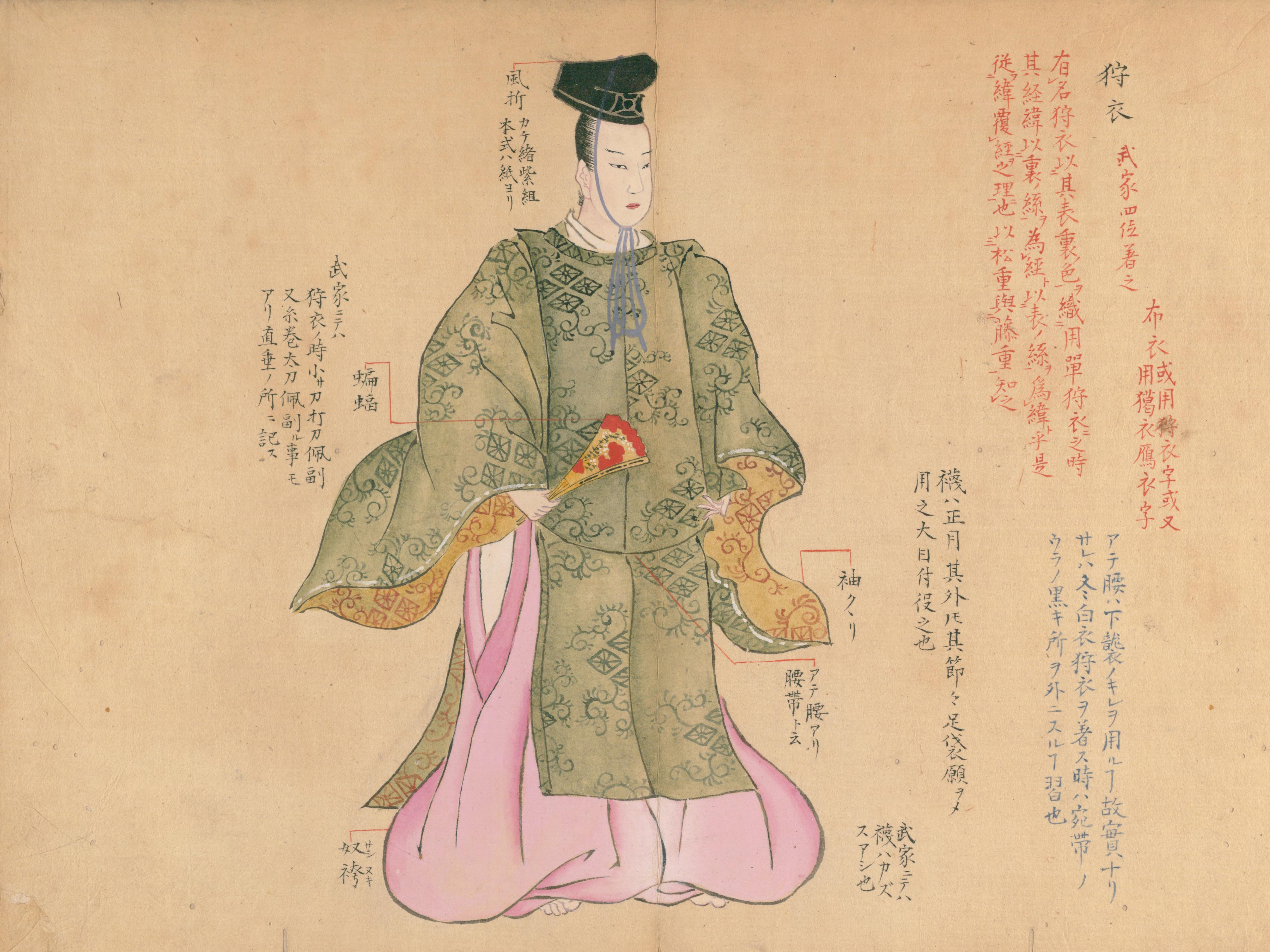 『装束着用之図』より、「狩衣」の図。